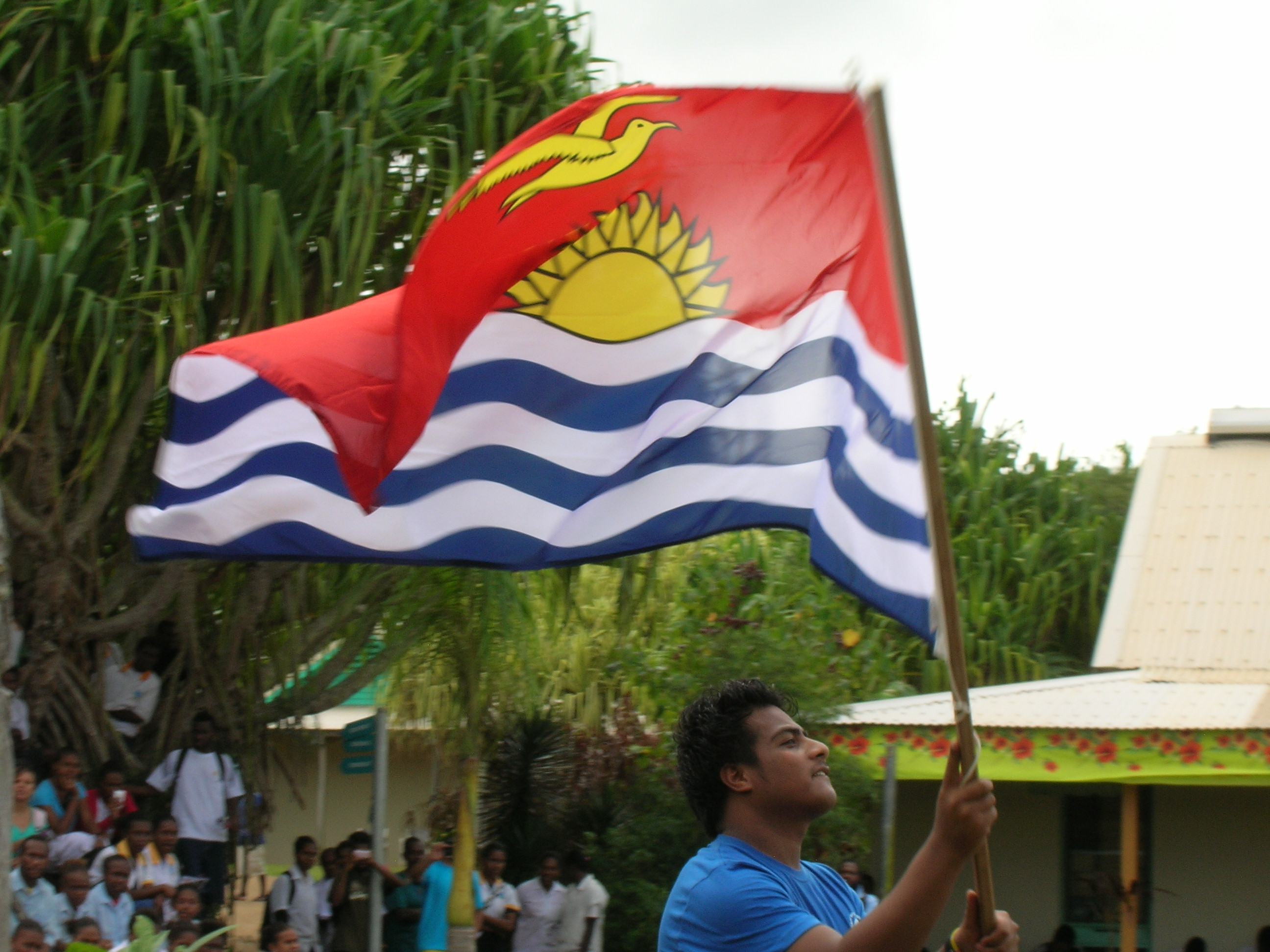 Kiribati students